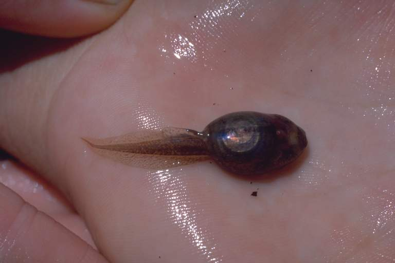 Litoria caerulea